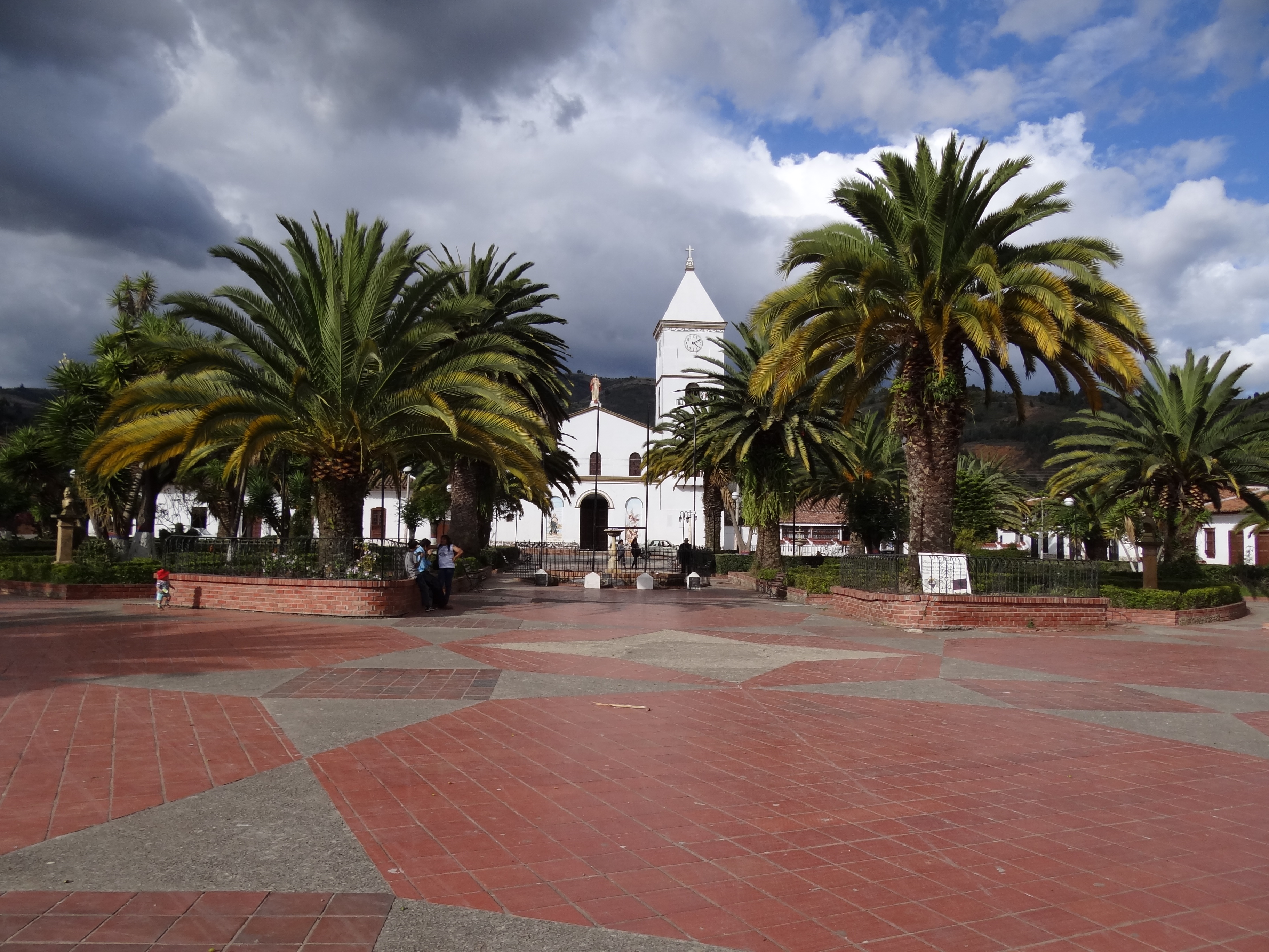 Parque principal del municipio de Floresta, departamento de Boyacá, Colombia.